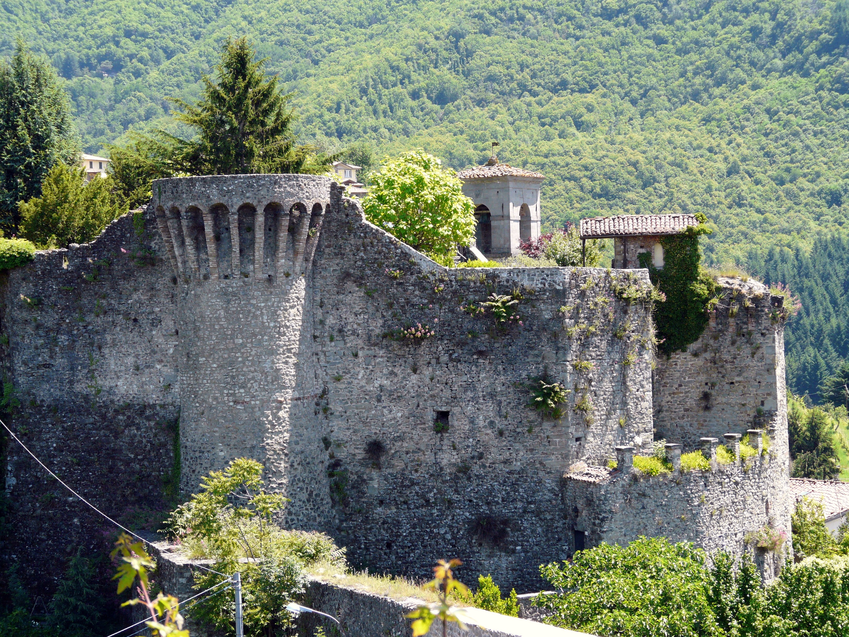 Mura, torri e porte di Castiglione di Garfagnana, Toscana, Italia